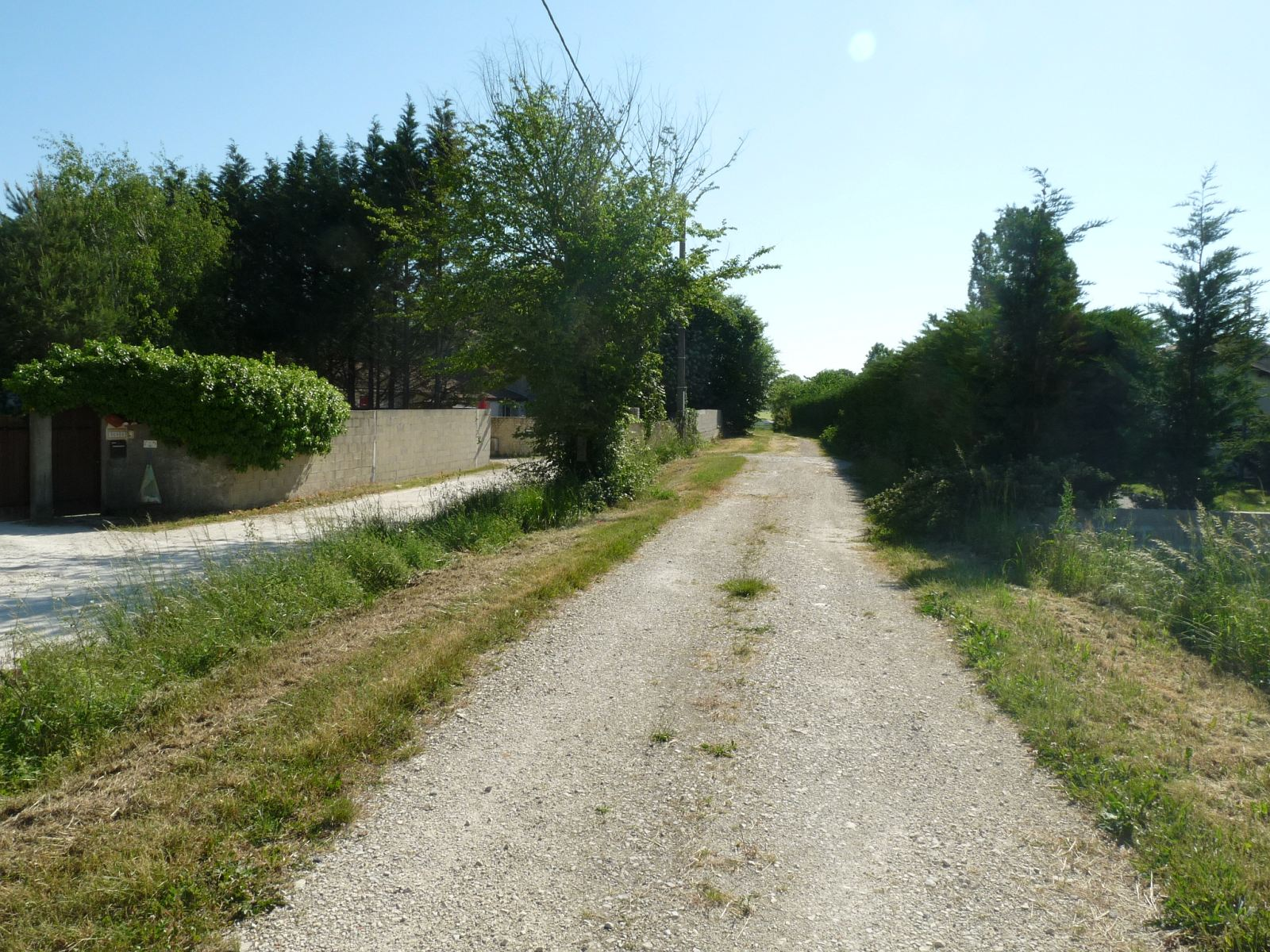 la voie d'Agrippa Saintes-Lyon à la sortie est de Villejoubert près du carrefour de la route de Tourriers, Charente, France; vue vers l'est avec chemin parallèle